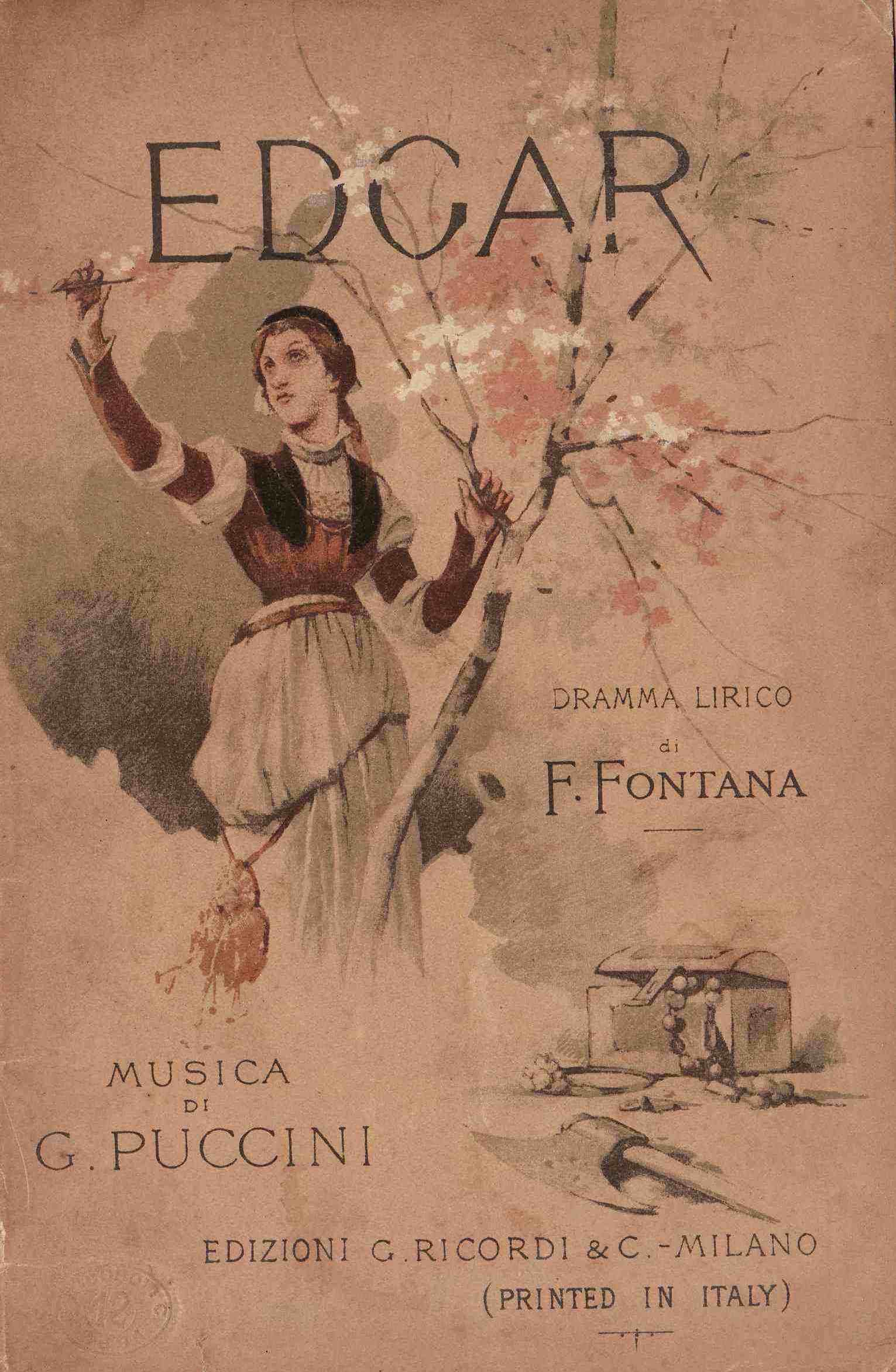 Cover of the libretto of Giacomo Puccini's Edgar by Giovanni Zuccarelli (1846-1897)